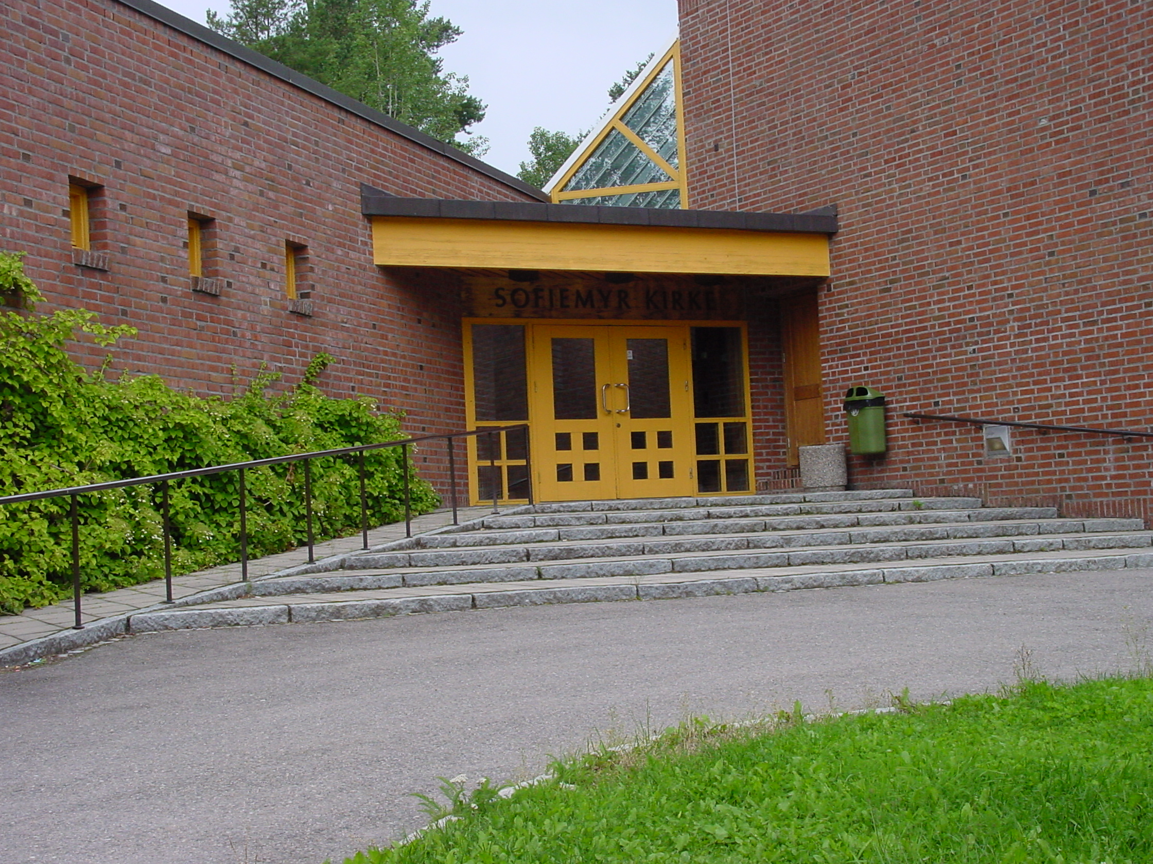 Hovedinngangen til sofiemyr kirke